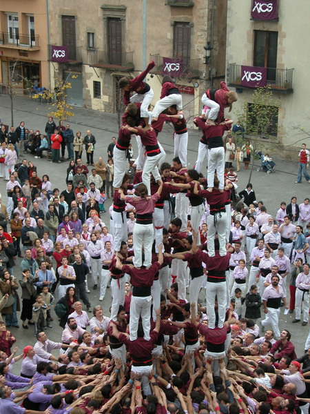 Primer 9 de 7 descarregat pels Xics de Granollers (Granollers, 09/11/2003)